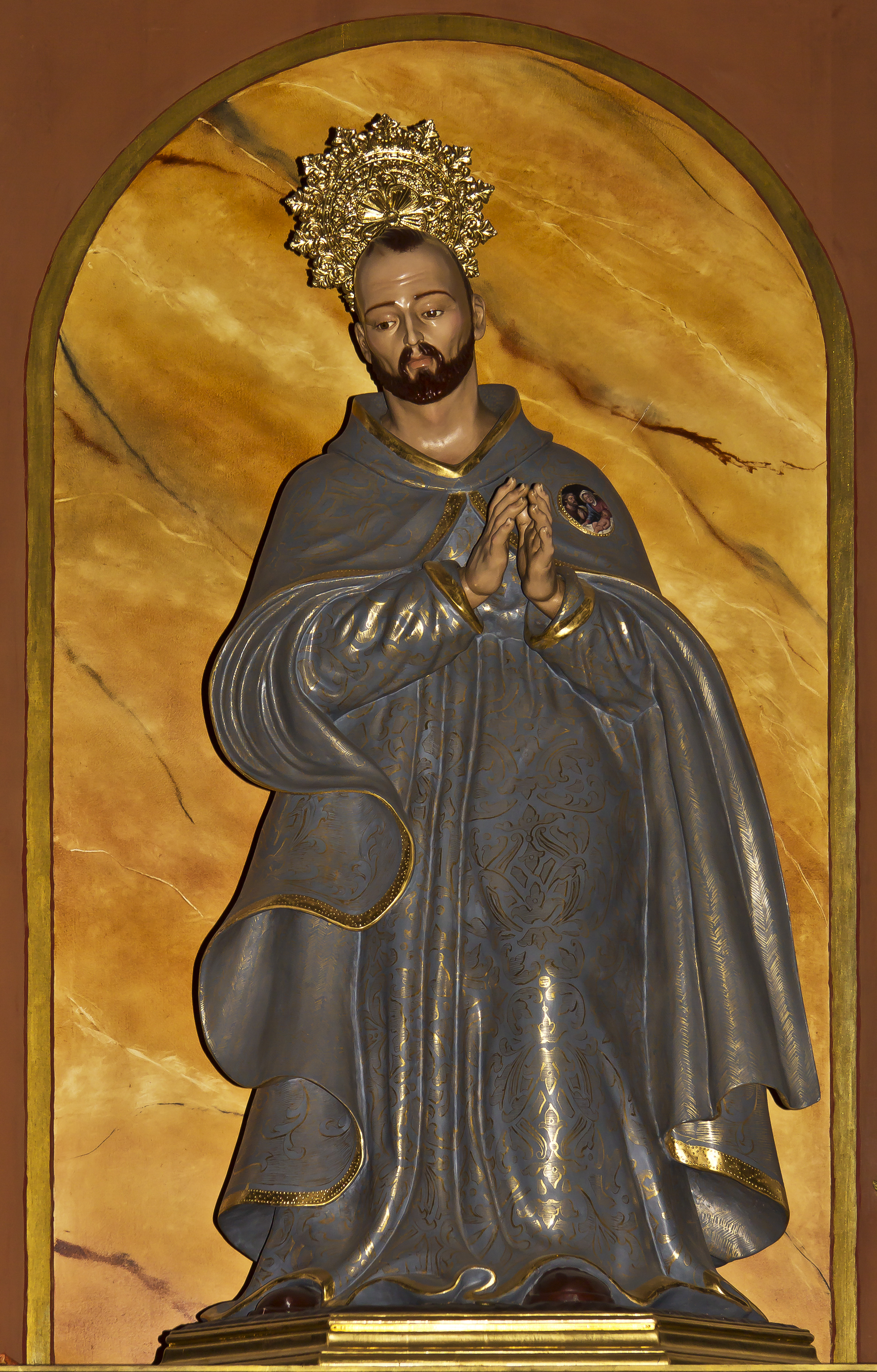 Die Figur des „Santo Hermano Pedro” befindet sich im rechten Seitenschiff der Kirche San Francisco in Santa Cruz de Tenerife.